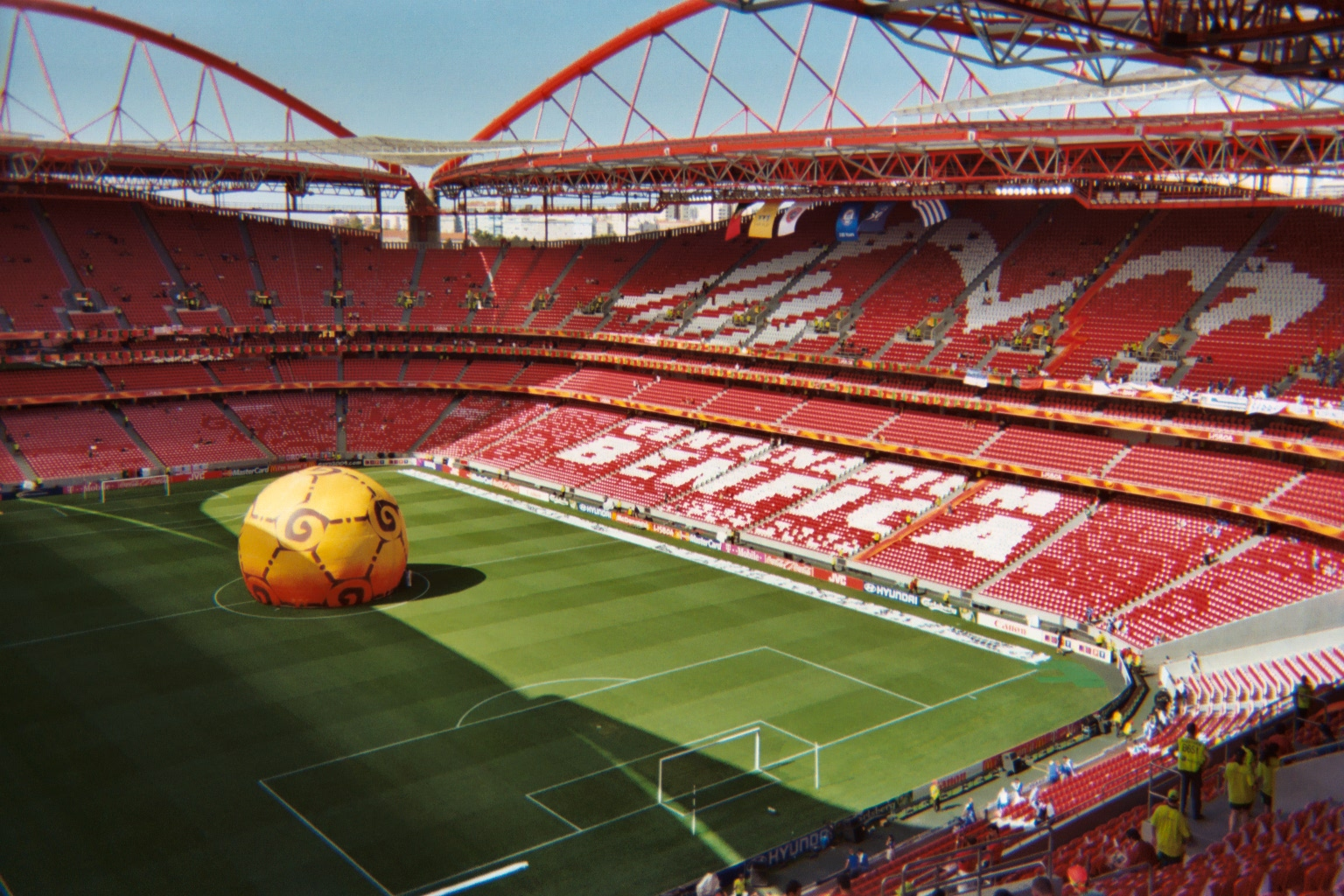 Estádio da Luz, before the Portugal–Greece match in Euro 2004.